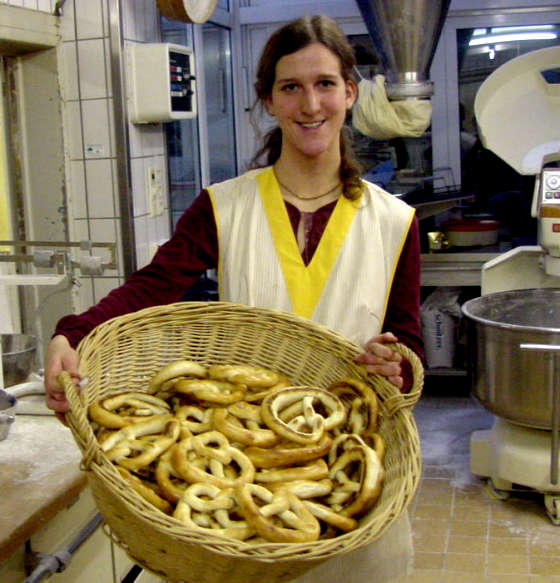 Biberacher Fastenbrezeln (aufgenommen in der Bäckerei Häring, Februar 2004. Im Bild: Ariane Schmidt)